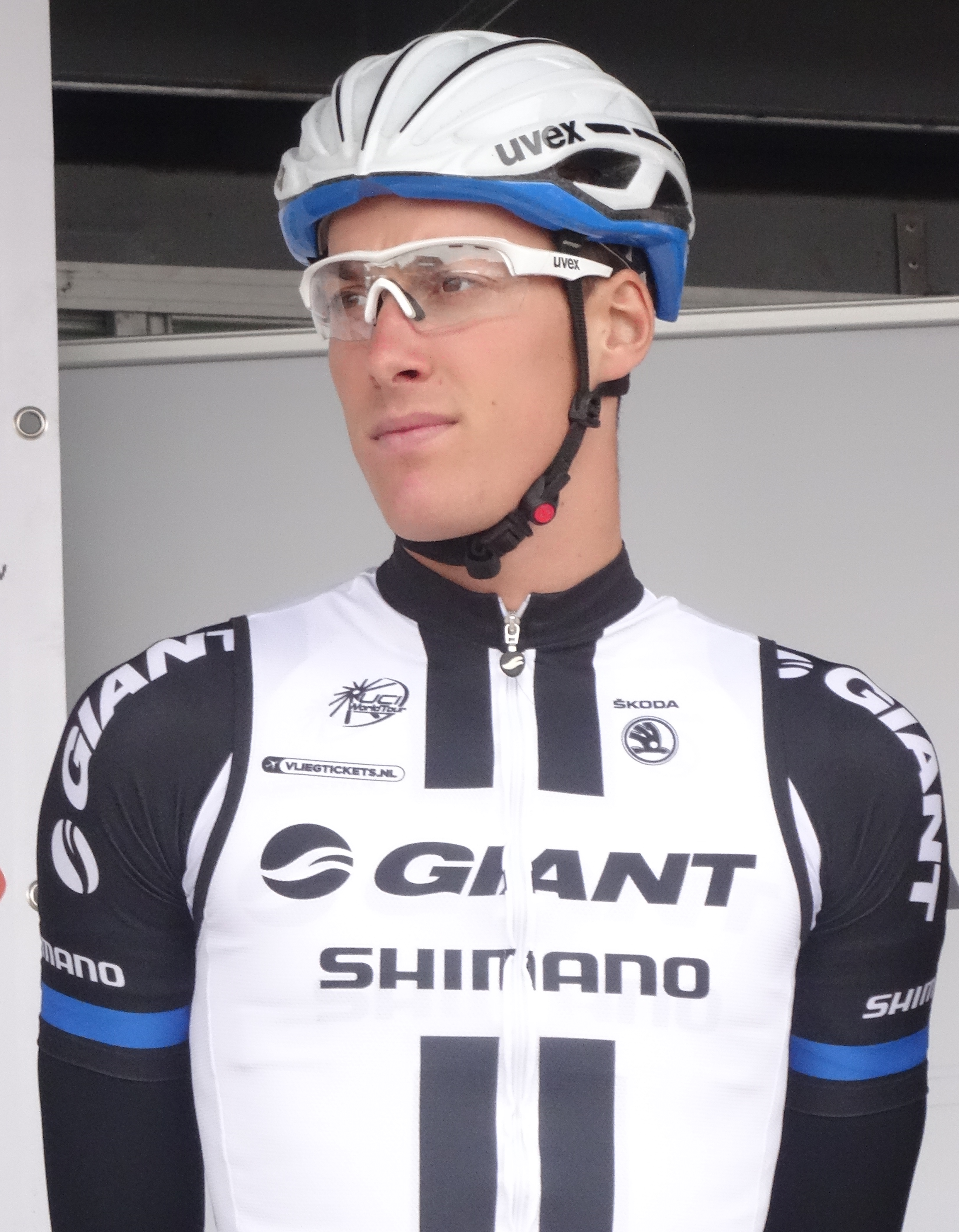 Reportage photographique réalisé le mercredi 24 septembre à l'occasion du départ et du début de la course du Circuit du Houtland 2014 à Lichtervelde, Belgique.